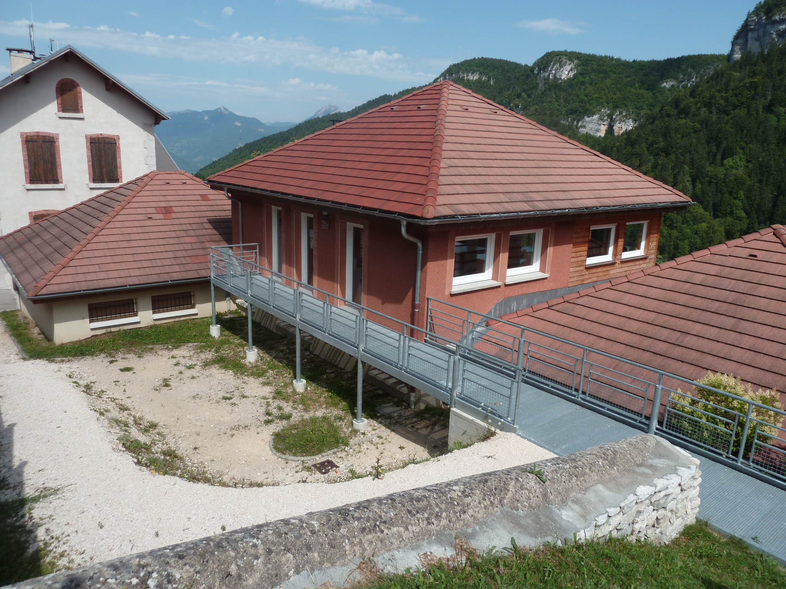 Engins (38) : L'école primaire.